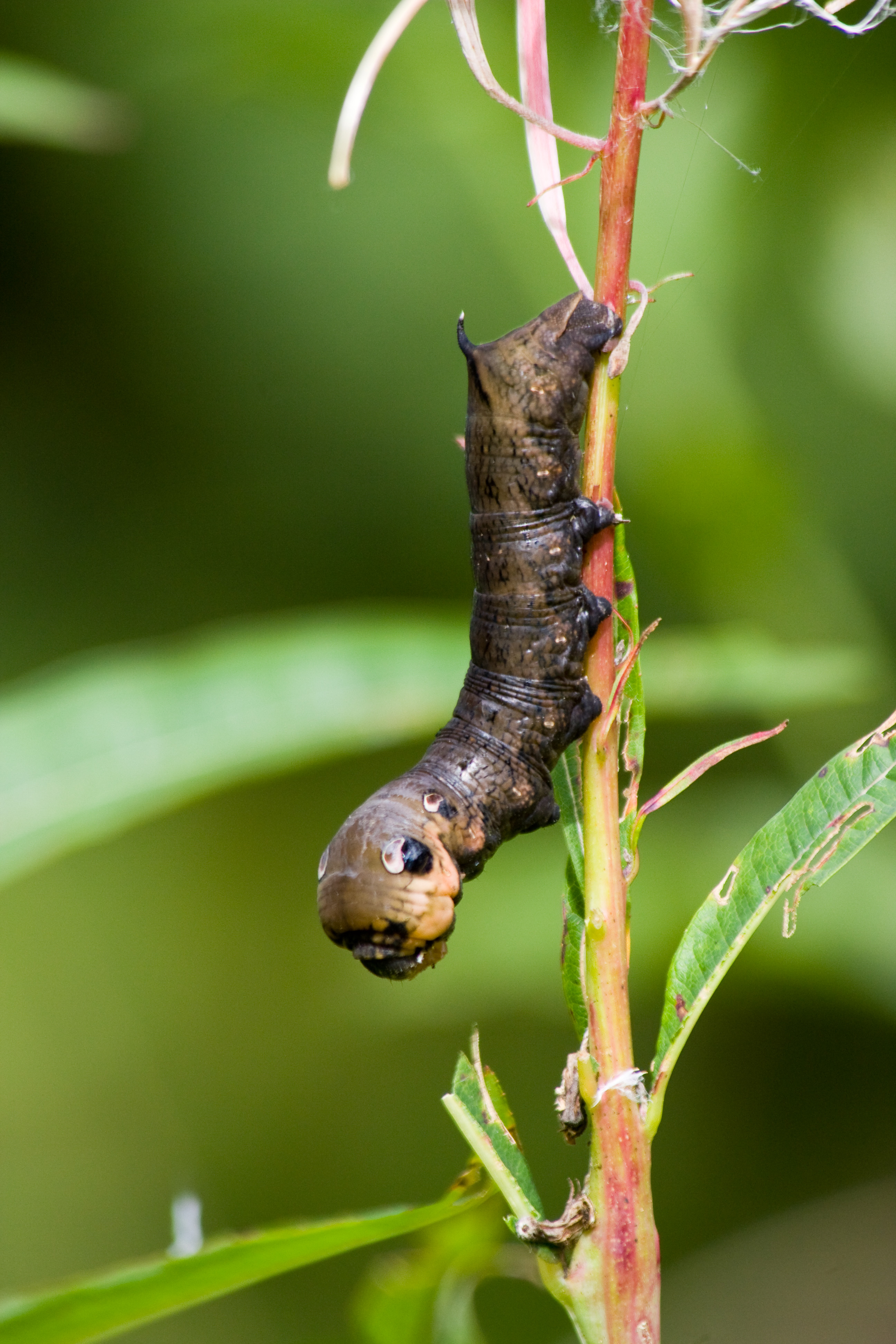 Suur-punasuru (Deilephila elpenor) röövik põdrakanepil.